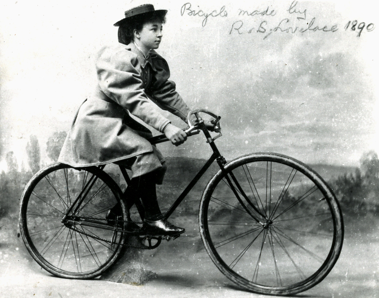 Tessie Reynolds, auch Tissie Reynolds, englische Radsportlerin, Autogrammkarte aus dem Jahr 1893, mit Autogramm